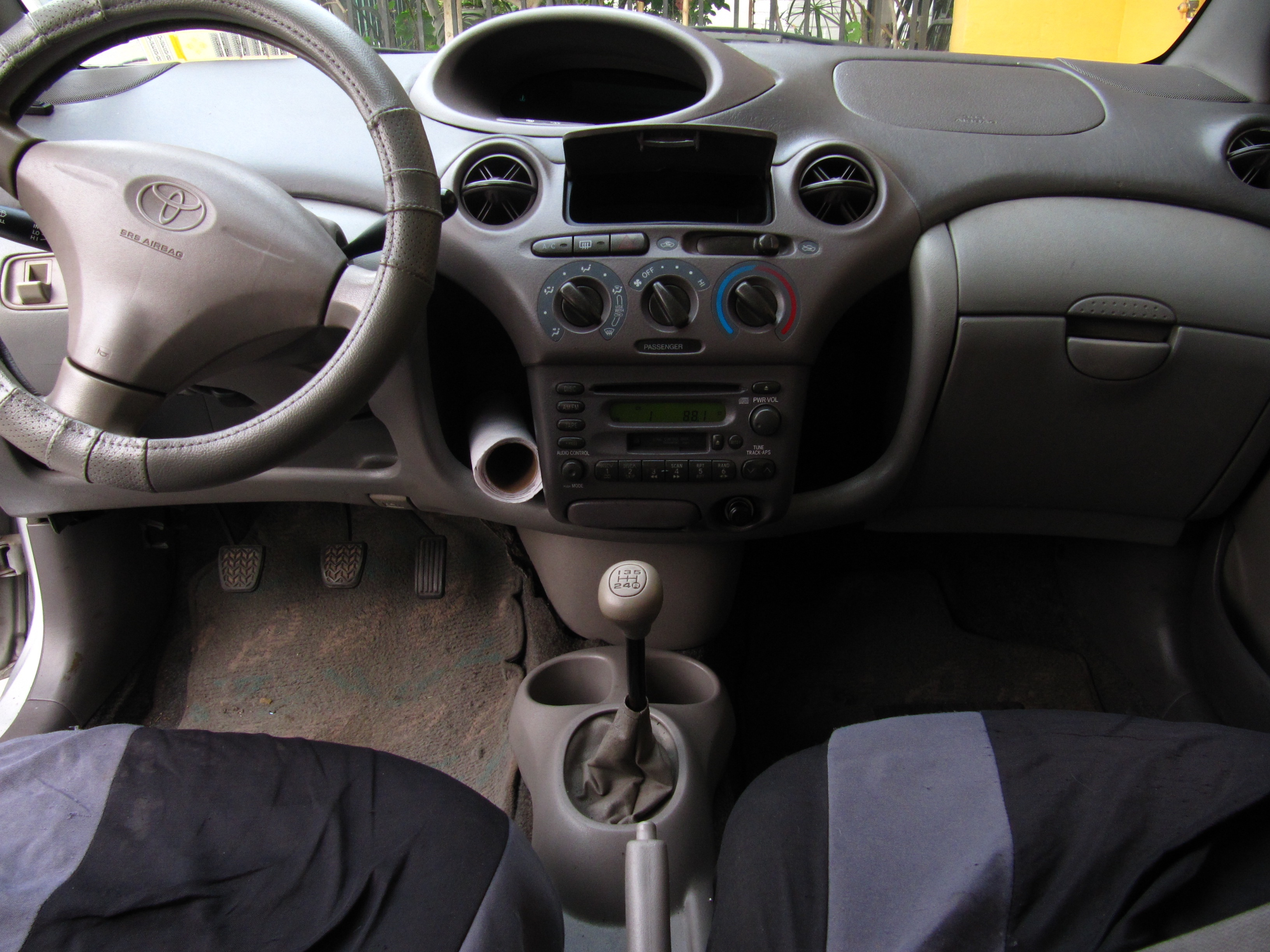 Toyota Platz Dashboard